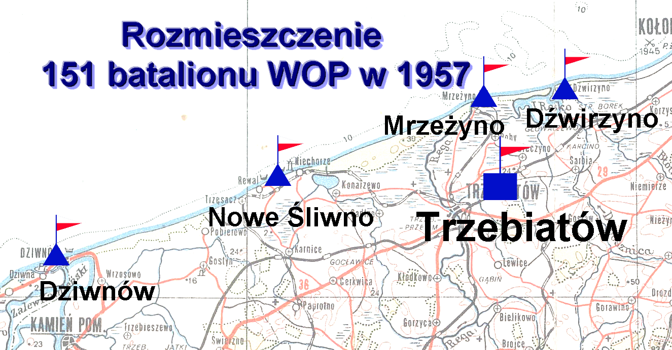 Rozmieszczenie 151 batalionu WOP w 1957